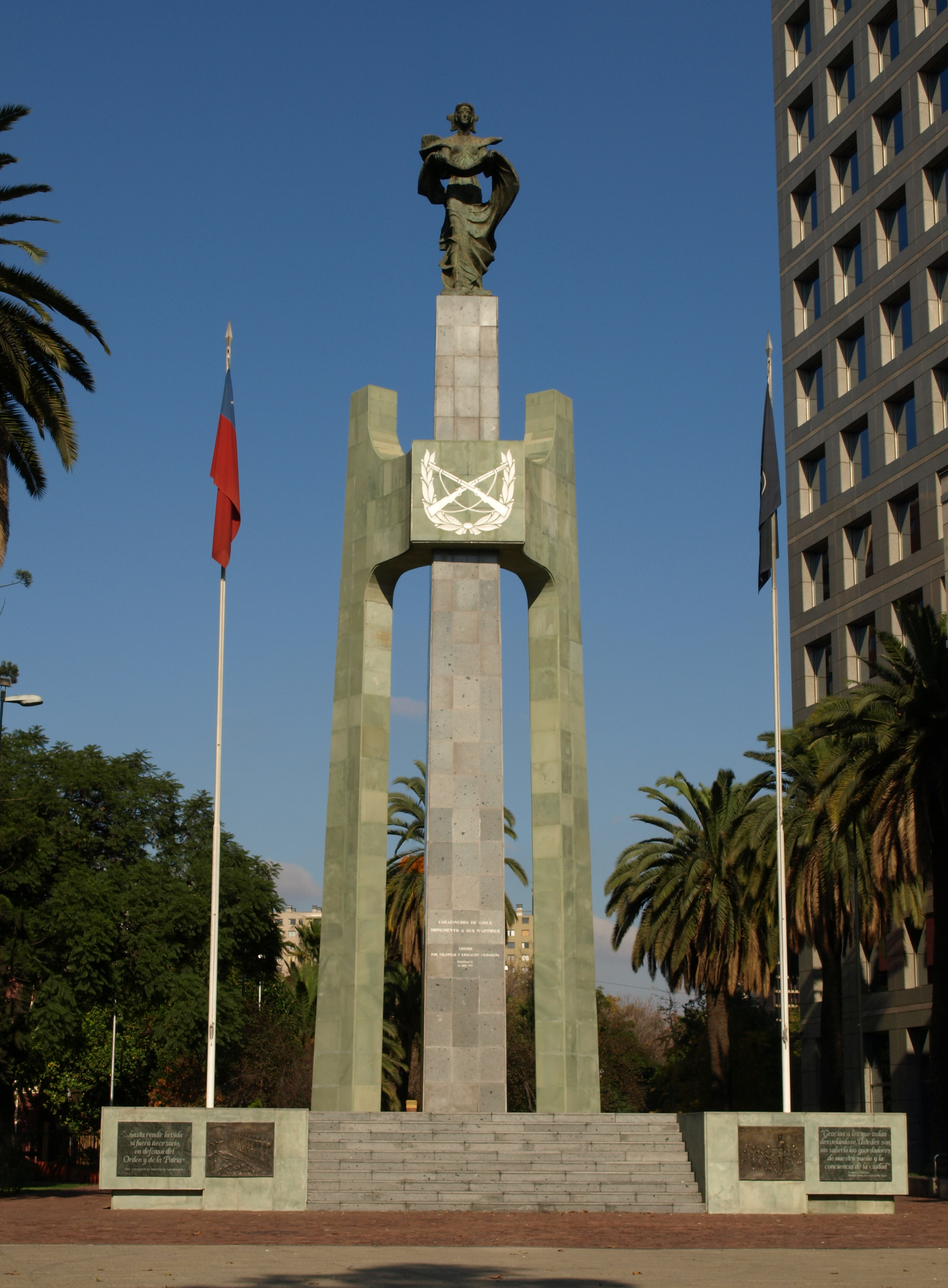 Gloria y victoria, monumento a los miembros del cuerpo de Carabineros de Chile caídos en acto de servicio. Obra del escultor chileno Héctor Román, ubicada en la Alameda a la altura del número 239, Santiago de Chile.